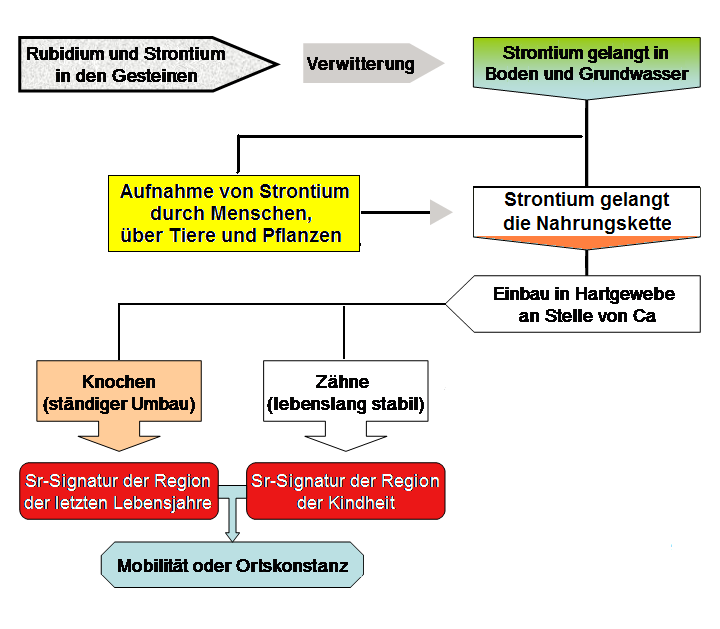 Strontium